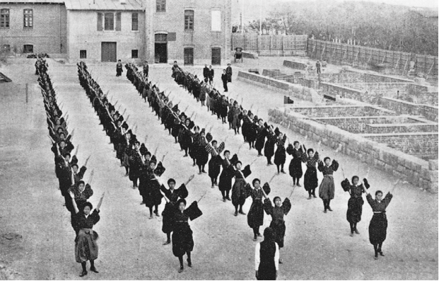 青岛日本高等女校临时教学楼，原德军野战炮兵营，德华大学教学楼